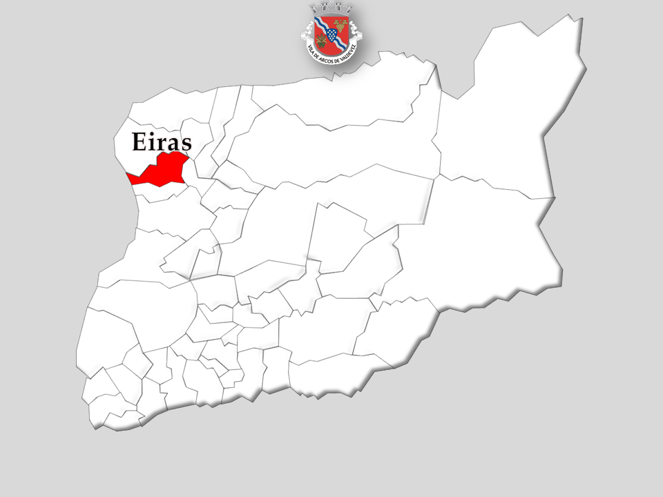 Censos 1864/2011